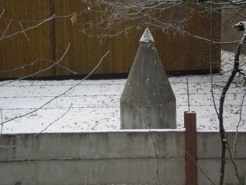 Einmannbunker v areálu Paramo Pardubice